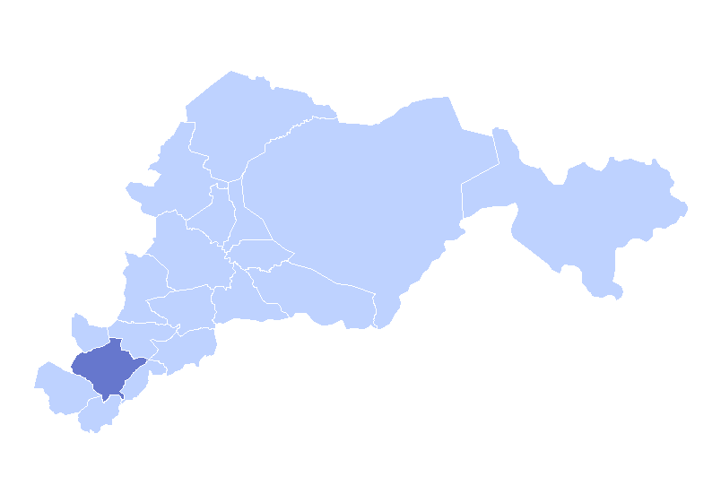 Położenie gminy Texiguat na mapie departamentu El Paraiso